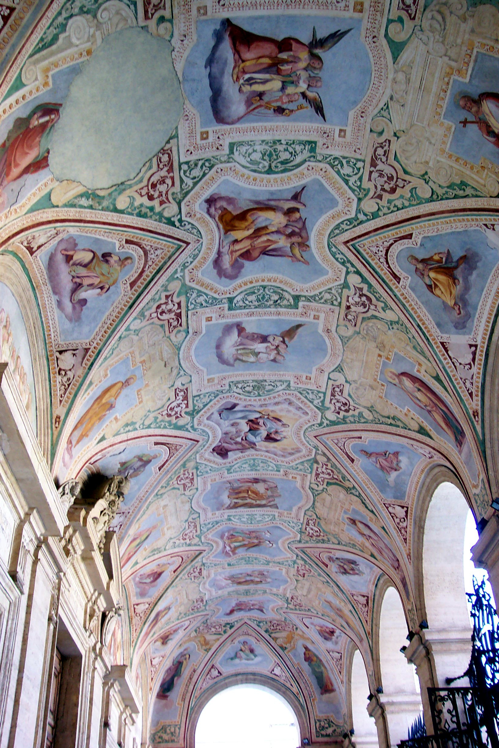 Basilica di San Giovanni in Laterano, Roma, Italy